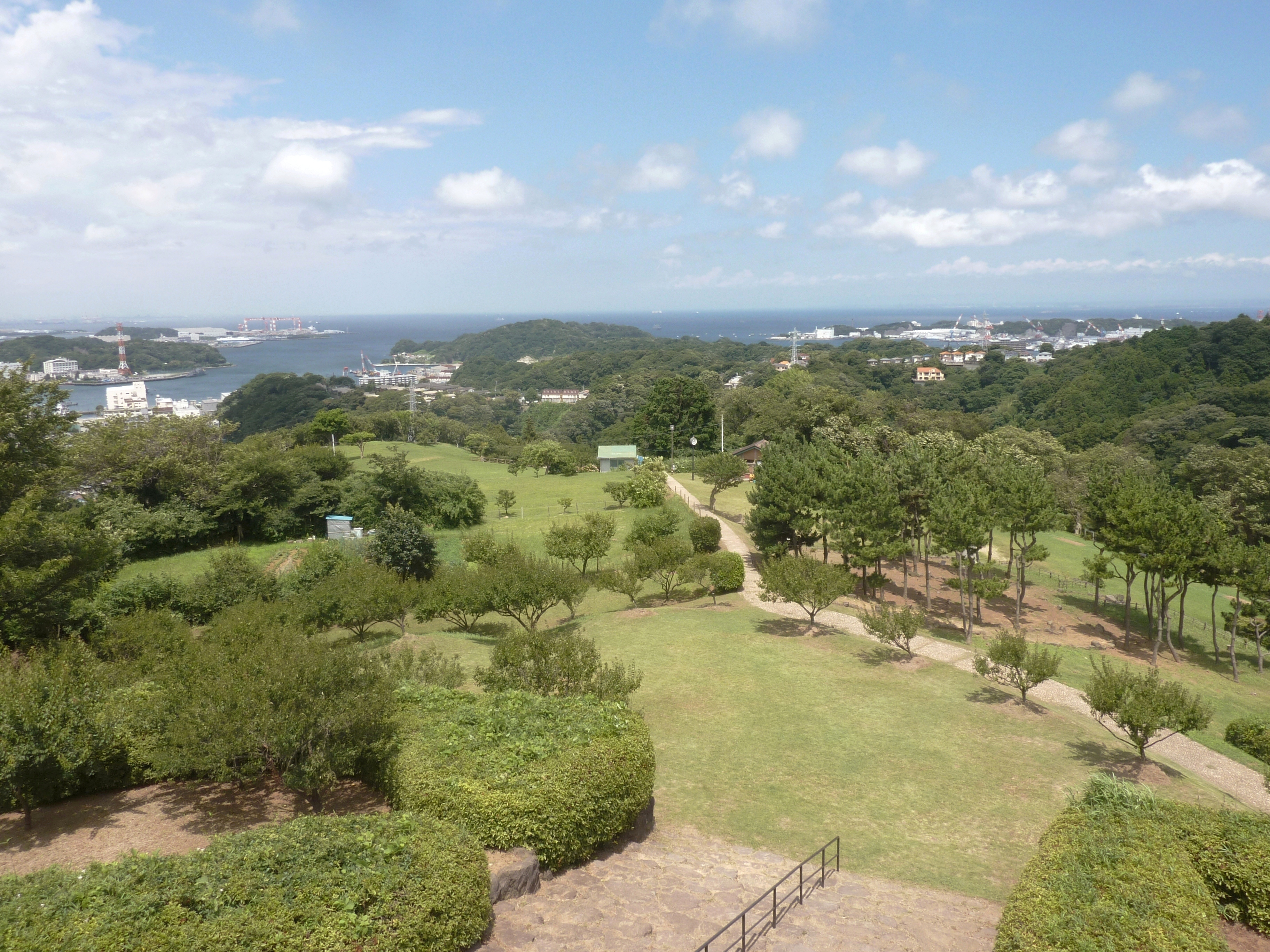 田浦梅の里の展望台から横須賀港方面を望む（神奈川県横須賀市）